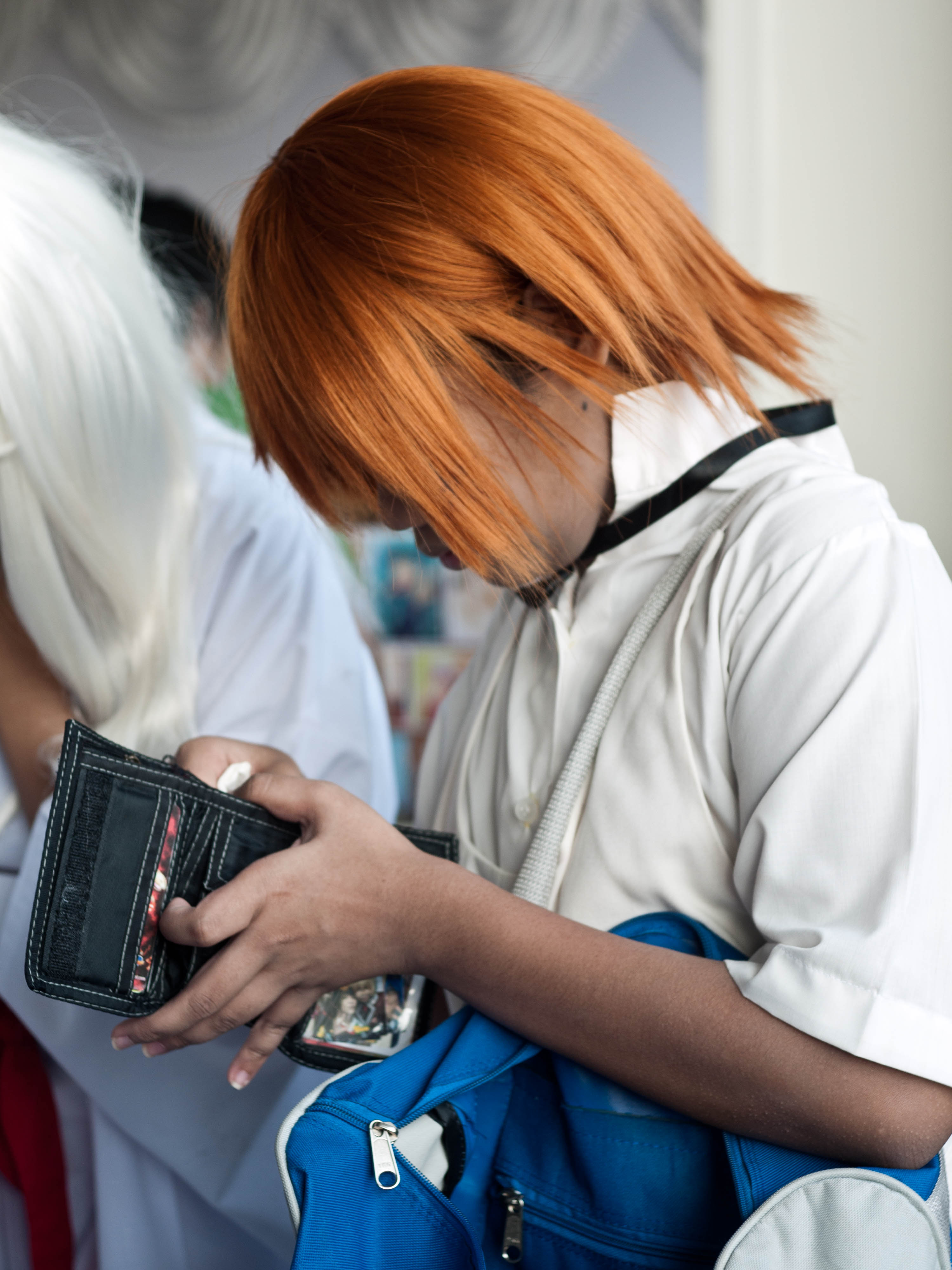 お金が… 足りない